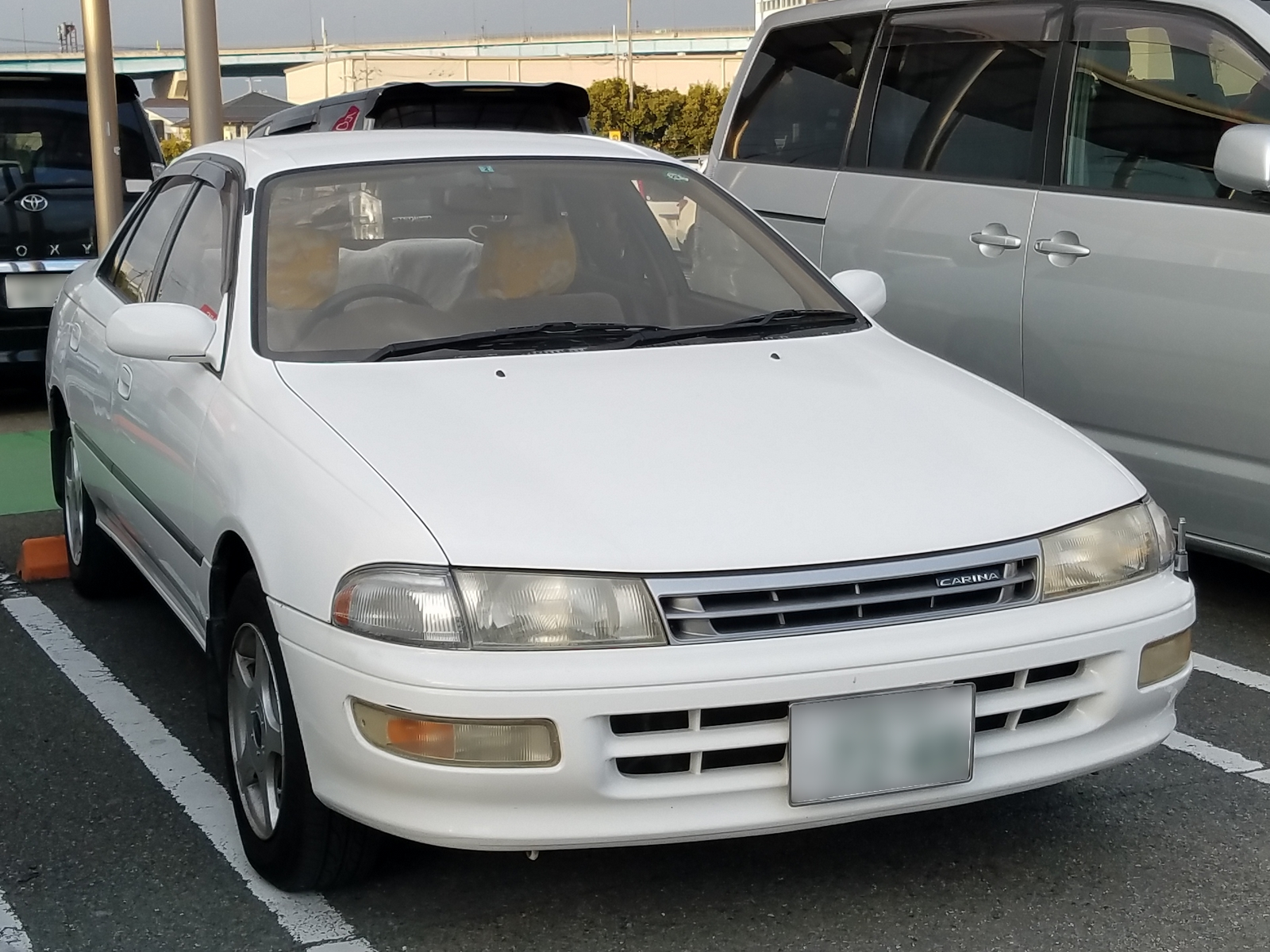 カリーナ 1.8マイロード（前期型）